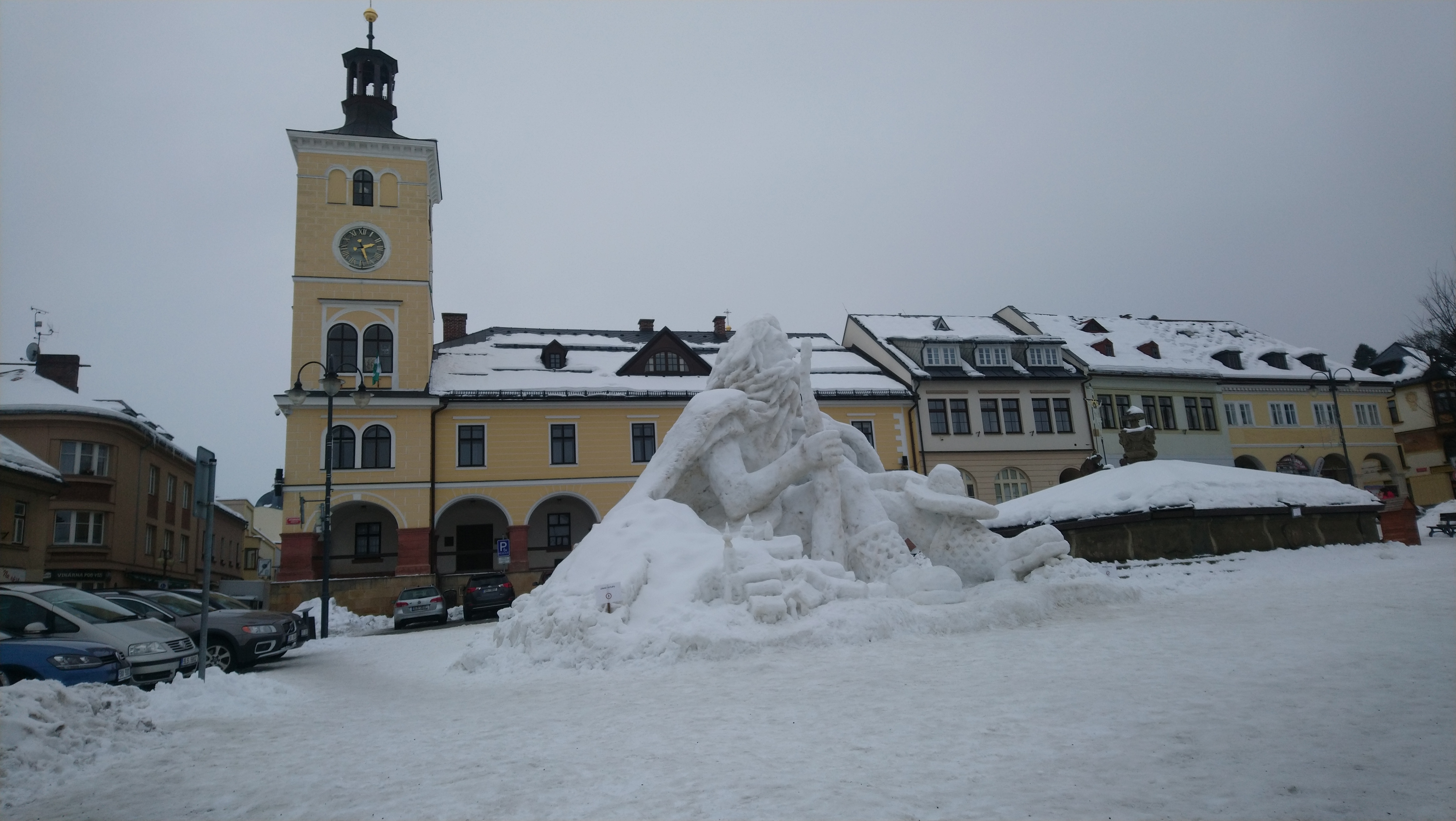 Sněhový Krakonoš na jilemnickém Masarykově náměstí, autor: p. Dufek se spolupracovníky